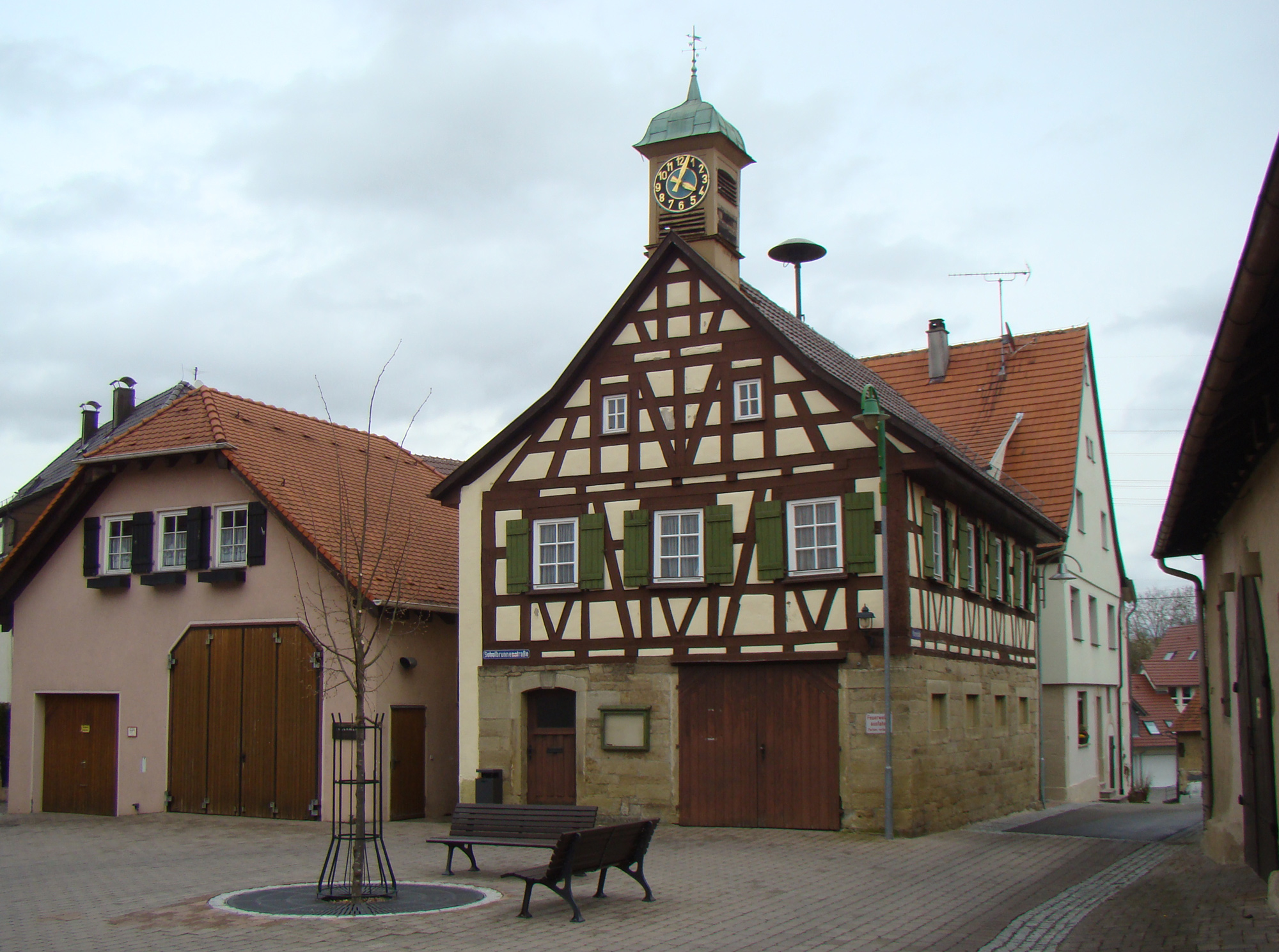 Altes Rathaus in Bönnigheim-Hofen